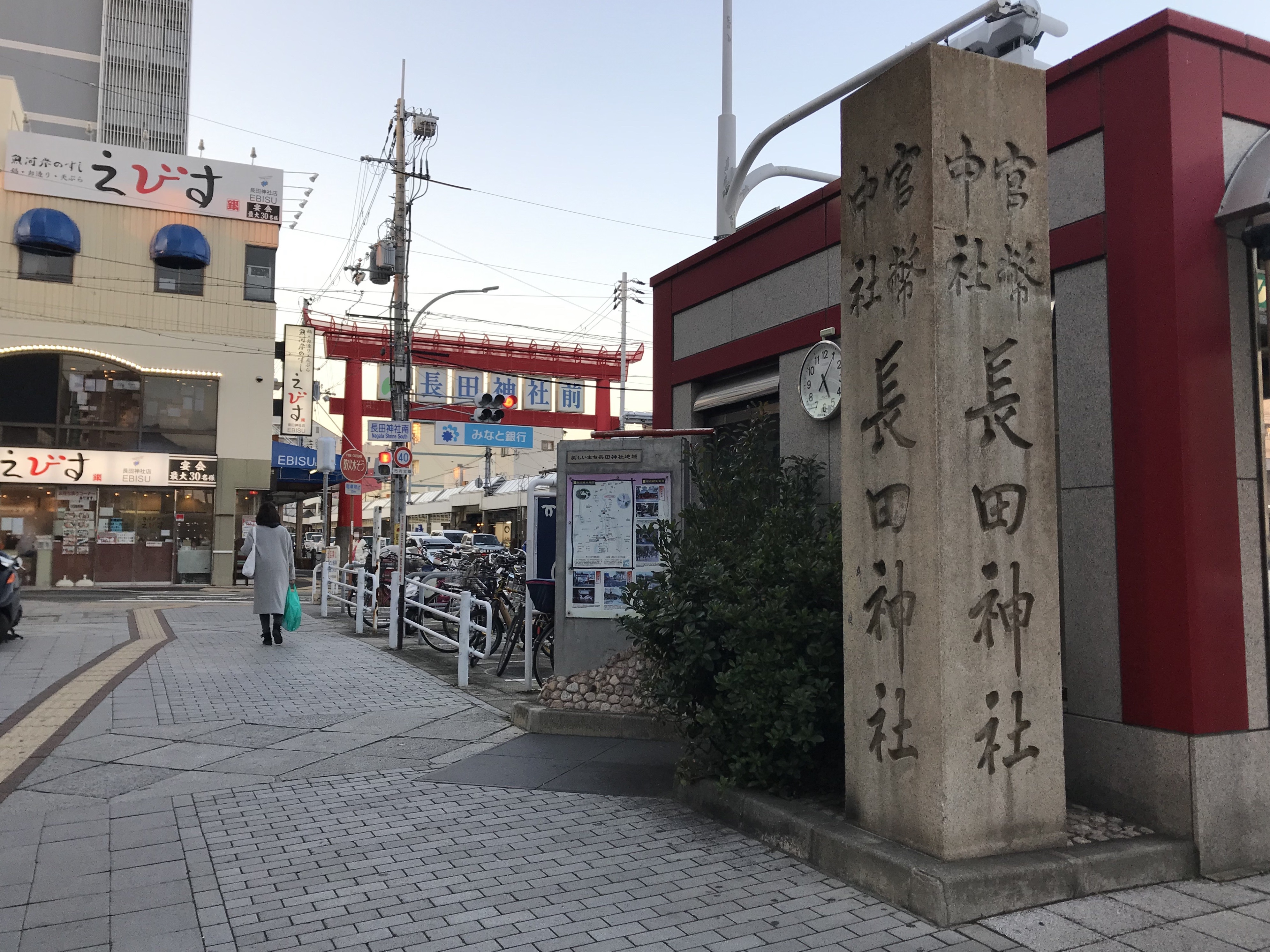 長田神社の社名標と参道の大鳥居